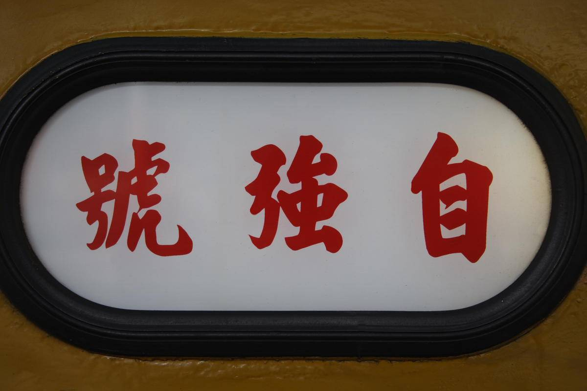 台湾鉄路管理局EMU100型電車 自強号のネームプレート